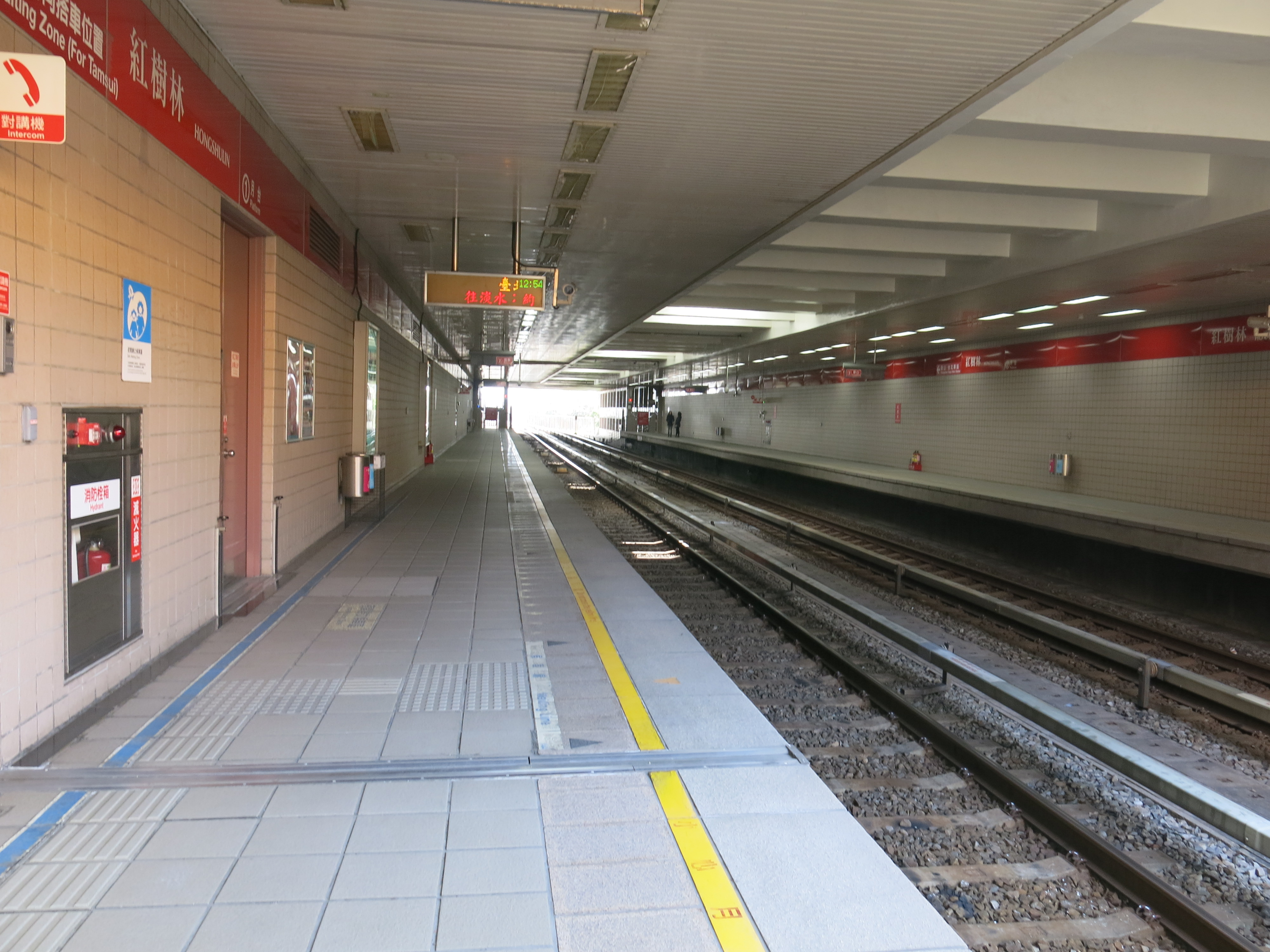 中文（台灣）: 台北捷運紅樹林站月台